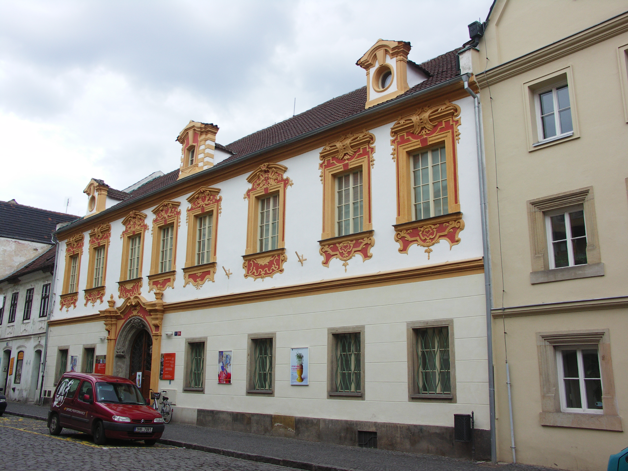 Městský dům Michalská 29/7, Litoměřice-Město.